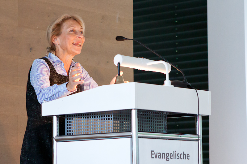 Prof. Dr. Elisabeth Gräb-Schmidt auf dem Graduiertenkolleg des Theologischen Arbeitskreises Pfullingen.